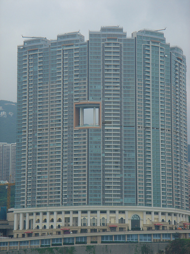 Hong Kong Feng shui building